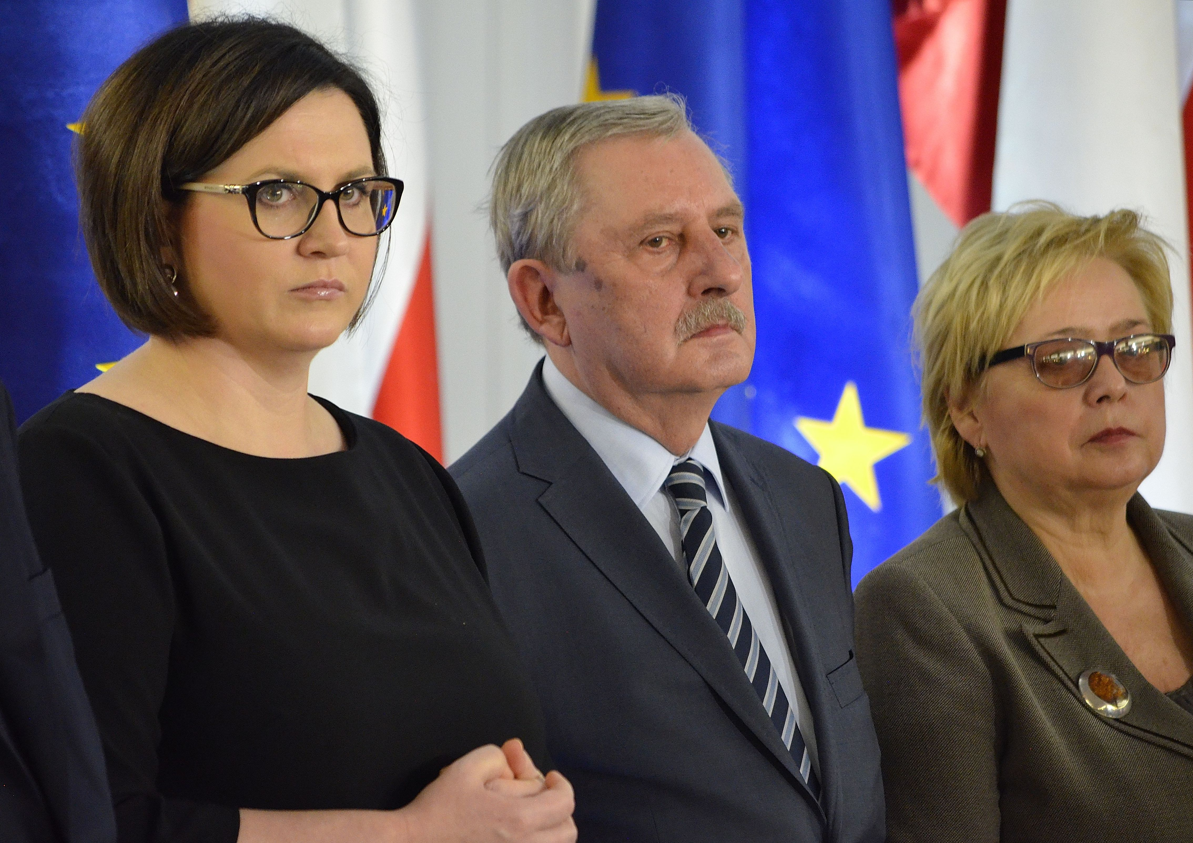 Małgorzata Sadurska, Roman Hauser i Małgorzata Gersdorf podczas uroczystości wręczenia zaświadczeń o wyborze nowo wybranym posłom w Sali Kolumnowej Sejmu